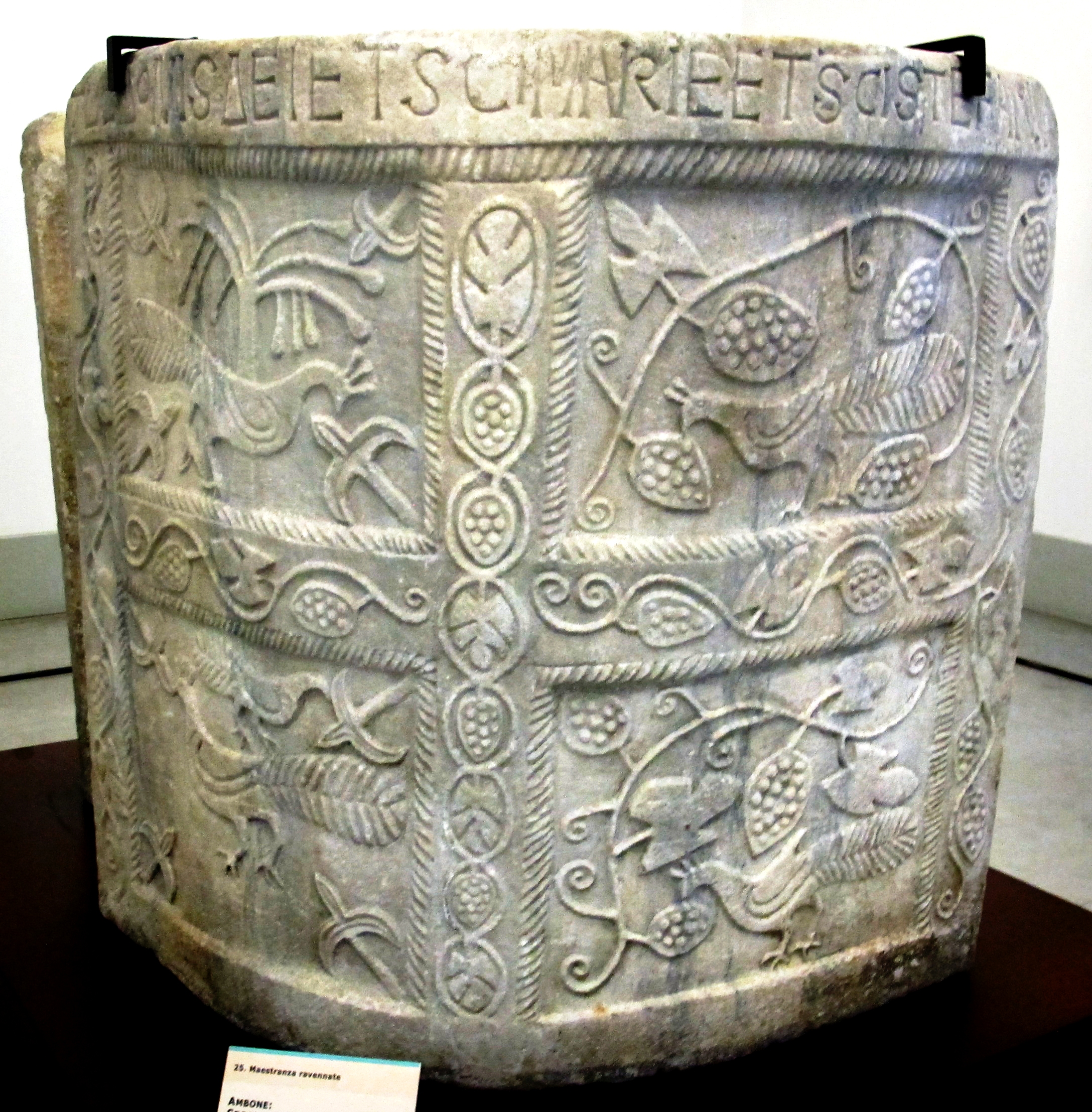 Ambone di Voghenza, VIII secolo circa, Museo della Cattedrale, Ferrara This is a photo of a monument which is part of cultural heritage of Italy.